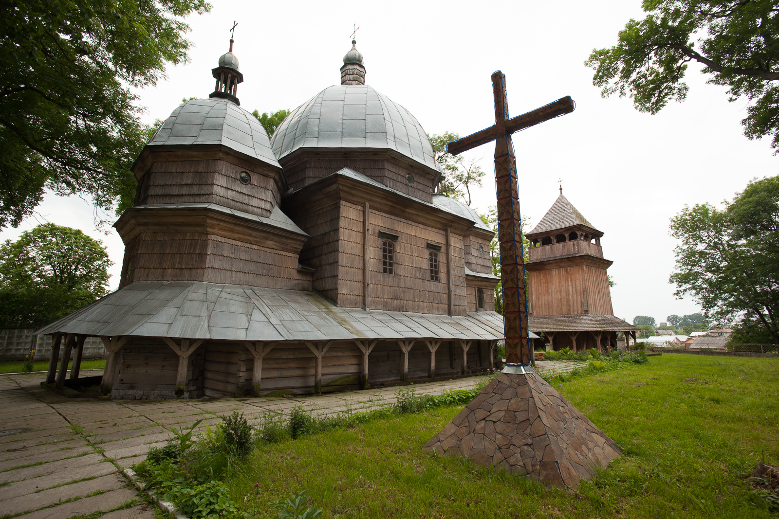 Церква Св.Миколи (дер.) 1667 р.